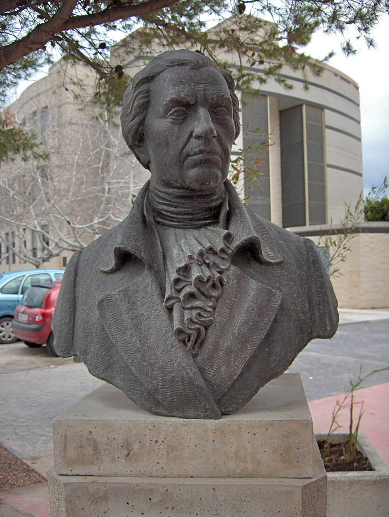 Francisco Javier Balmis, busto situado en la Facultad de Medicina de la Universidad Miguel Hernández de San Juan de Alicante, España.